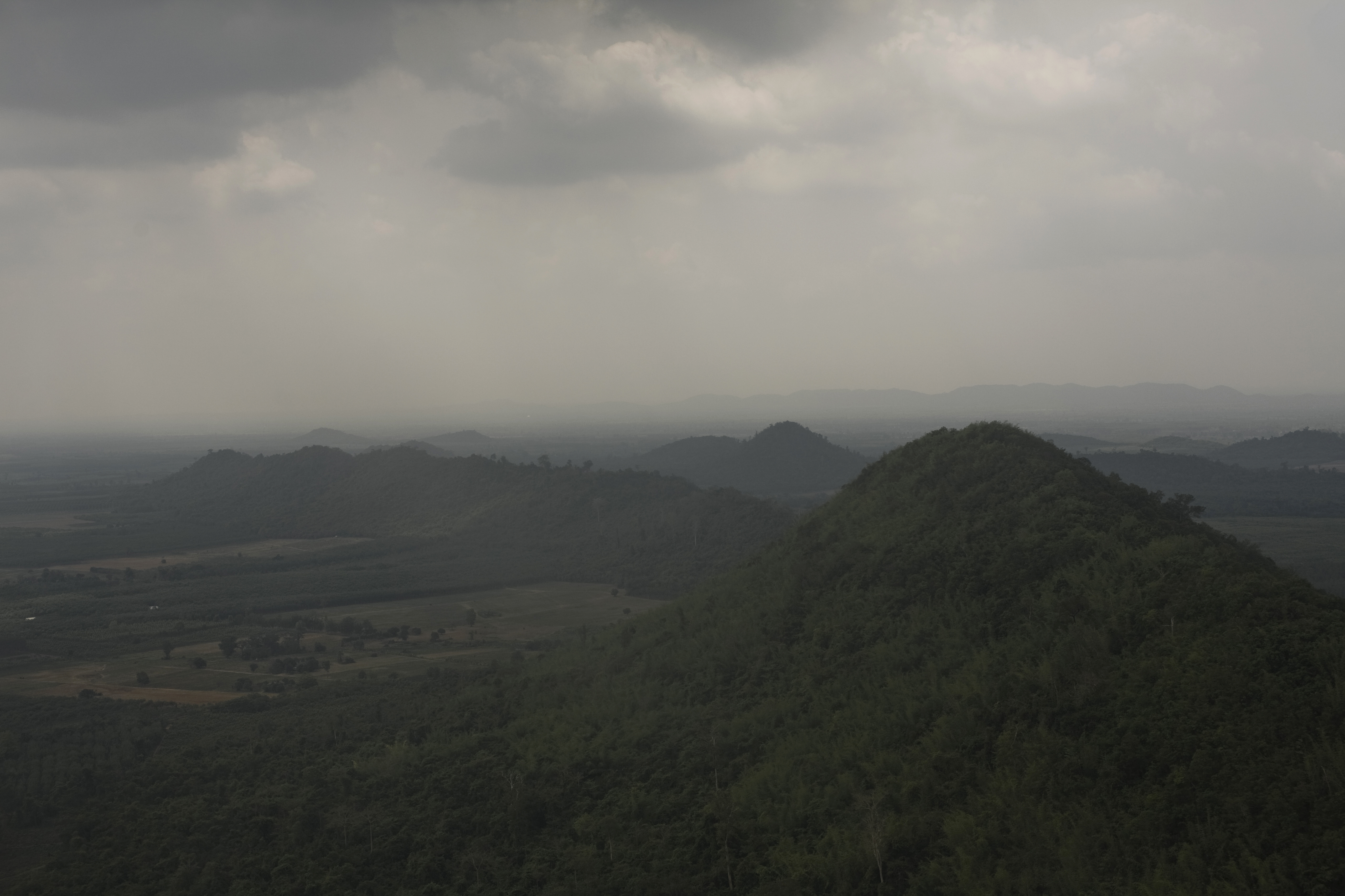 นายกรัฐมนตรี เป็นประธานพิธีเปิดงานรวมใจภักดิ์อนุรักษ์สิ่งแวดล้อมในโครงการ "ทำดีเพื่อแผ่นดิน ถวายพระเจ้าแผ่นดิน และโครงการ "ปลูกต้นไม้ สร้างฝาย ขยายคูคลอง สนองพระมหากรุณาธิคุณ" ณ เขตรักษาพันธ์ุสัตว์ป่าเขาอ่างฤาไน จังหวัดฉะเชิงเทรา วันศุกร์ ที่ 22 เมษายน พ.ศ.2554 (Photographer attached to the Prime Minister of the Kingdom of Thailand (H.E.Mr.Abhisit Vejjajiva) : Peerapat Wimolrungkarat / พีรพัฒน์ วิมลรังครัตน์) @is50mm